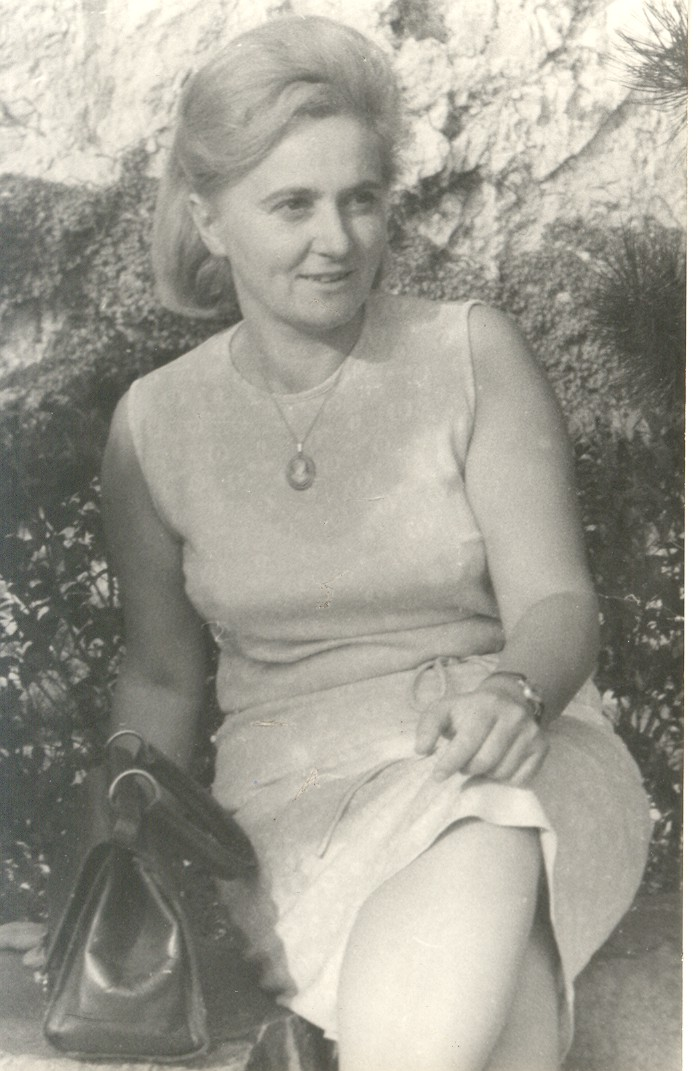 Мира Алечковић (1960). Уступио Срђа Николић, син Мире Алечковић.